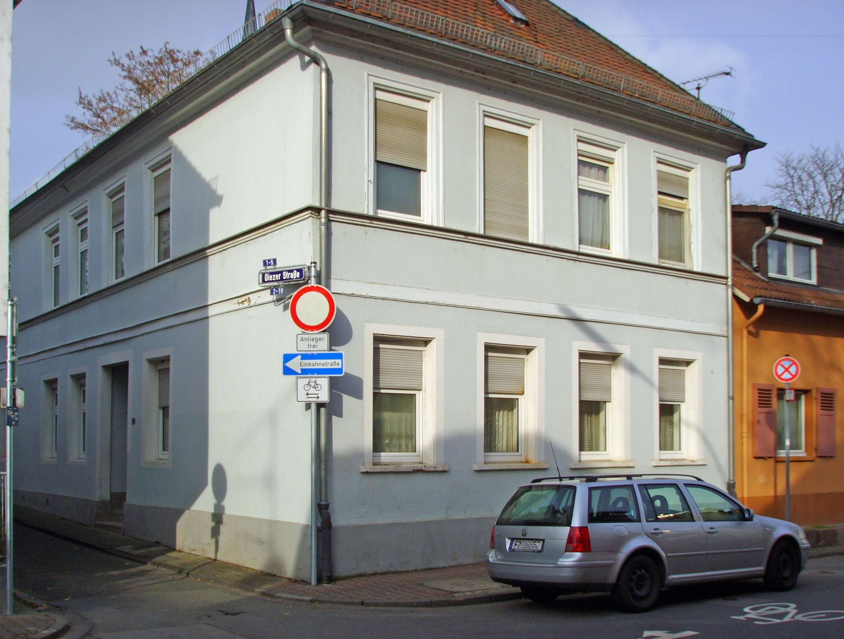 Frankfurt am Main-Heddernheim, ehemaliges Schulhaus, Diezer Straße / Ecke Alt Heddernheim, erste Hälfte 18. Jahrhundert